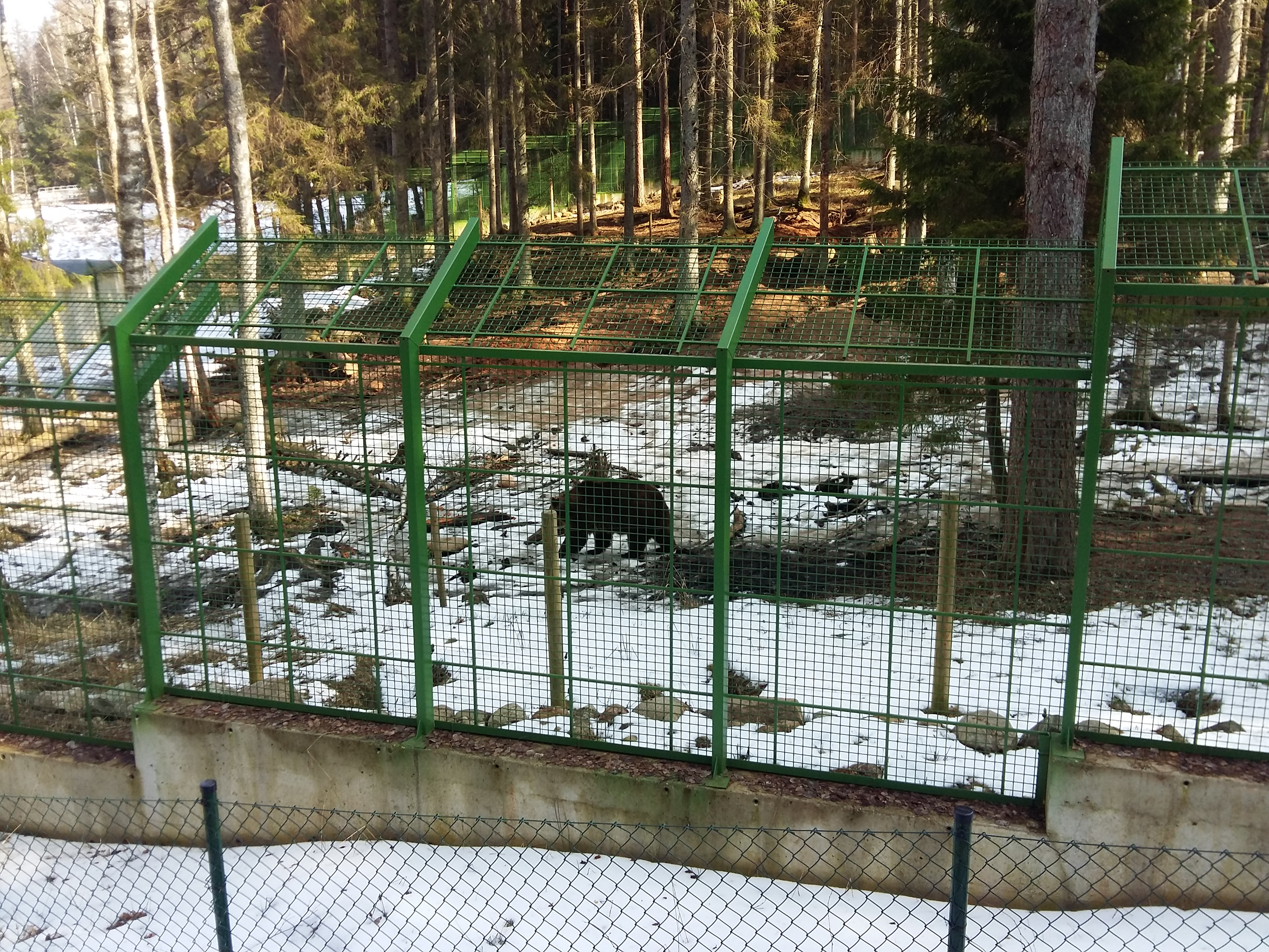 Lāču mājas voljers.